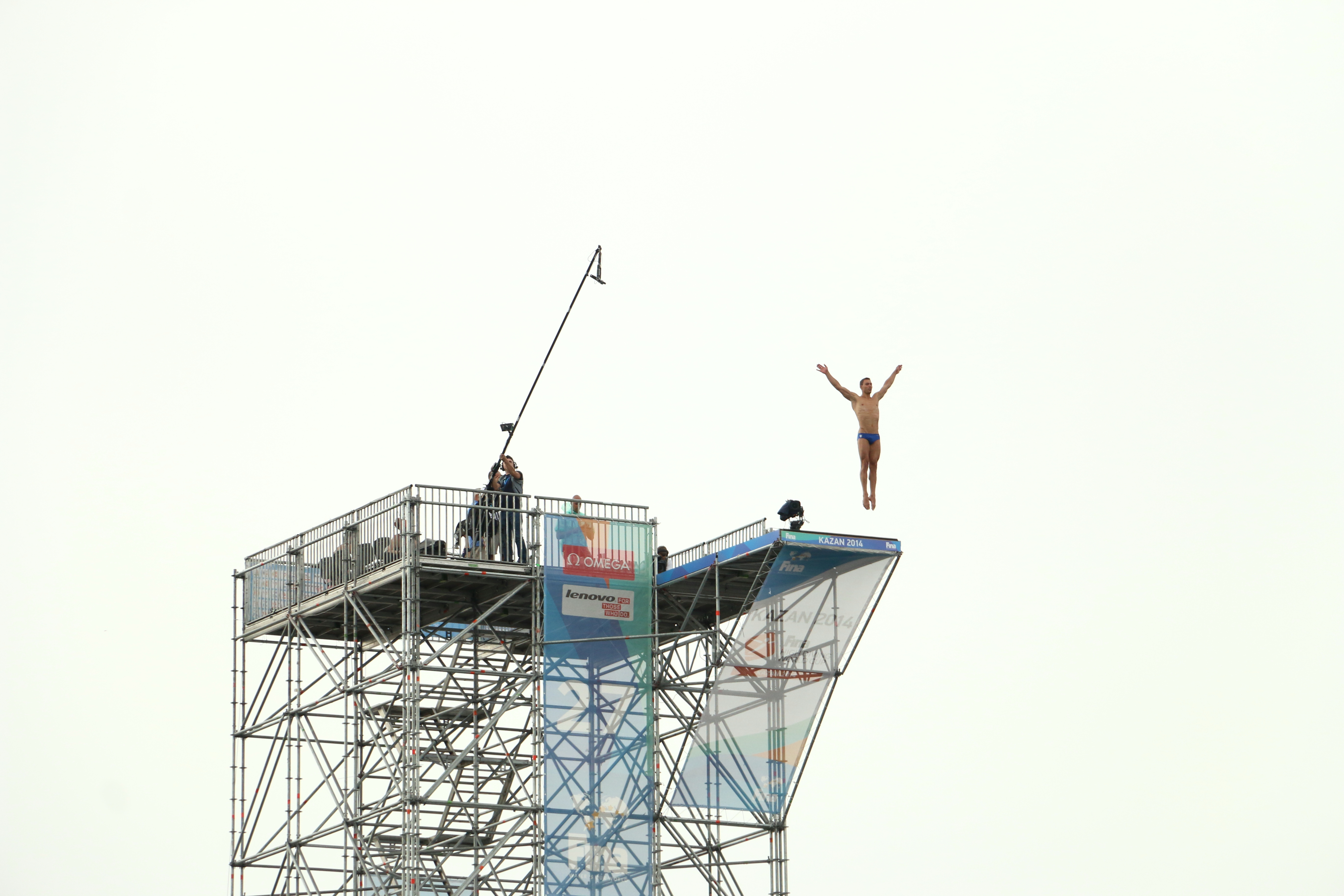 Первый кубок мира по Хай-дайвингу в Казани. Август 8-10, 2014 год.